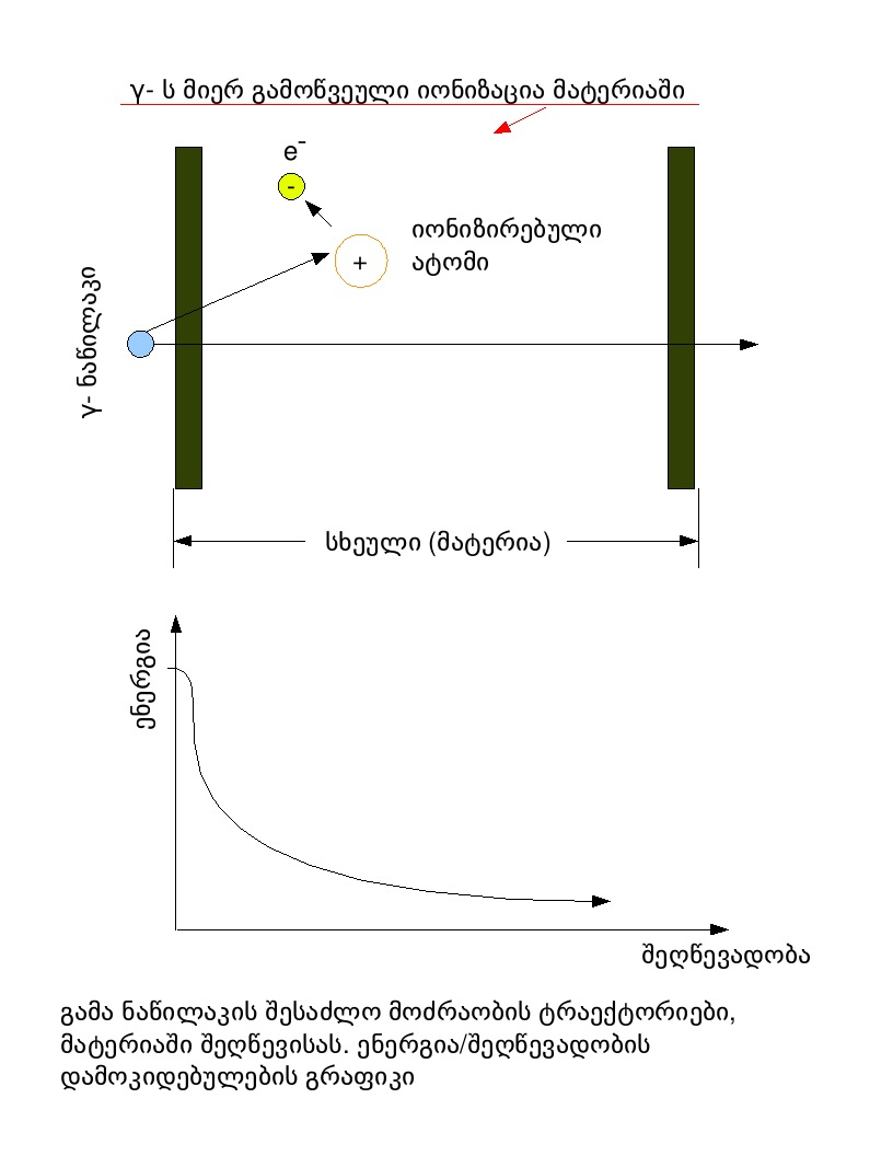 ნახატზე ნაჩვენებია გამა-ნაწილაკის მოძრაობის შესაძლო ტრაექტორიები (შესაძლებელია არსებობდეს სხვანაირი ტრაექტორიებიც), როდესაც იგი რაიმე სხეულში აღწევს. აქ მან შეიძლება ამ სხეულის ატომის ან ატომების იონიზაციაც გამოიწვიოს. გამა ნაწილაკი განიცდის მთელი მოძრაობის მანძილზე სხეულის ატომებთან ან მათ ელექტრონეთან დაჯახებებს რის შედეგადაც კარგავს ენერგიას.